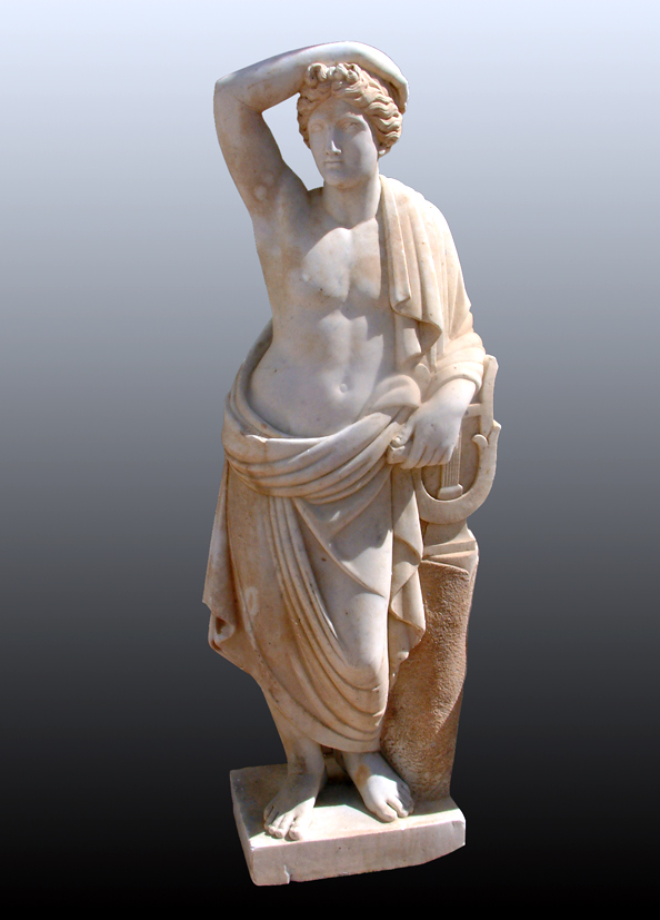 Apolo citáreo